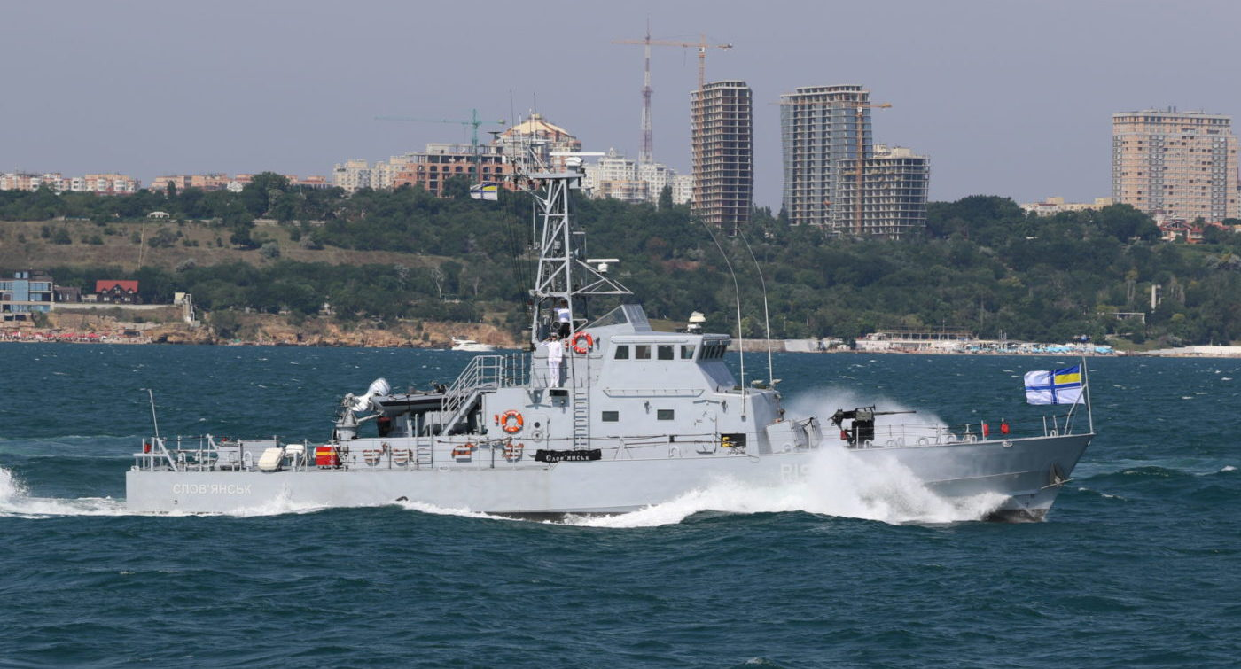 патрульний катер типу «Айленд» B-серії, побудований для Берегової охорони США. 27 вересня 2018 року був переданий Україні. Бортовий номер P190, названий на честь міста Слов'янськ у Донецькій області.